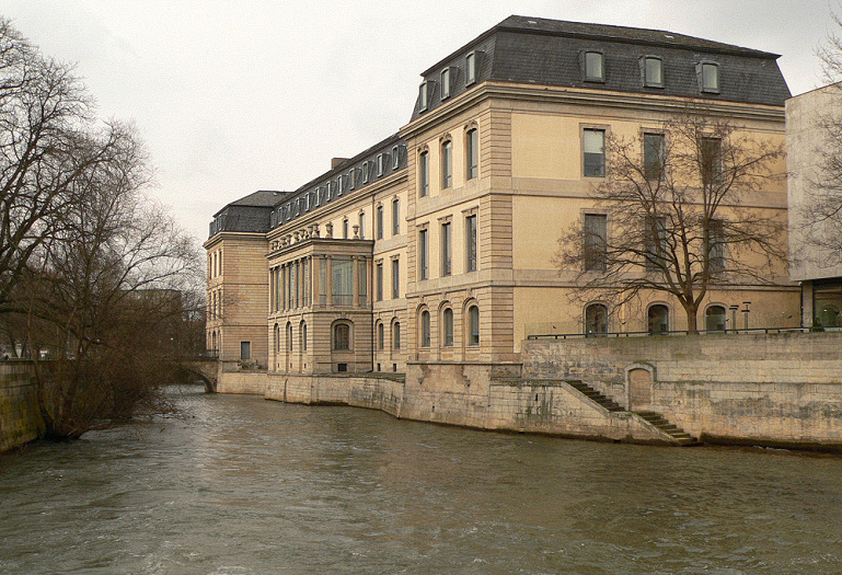 Leineschloss und Leine in Hannover